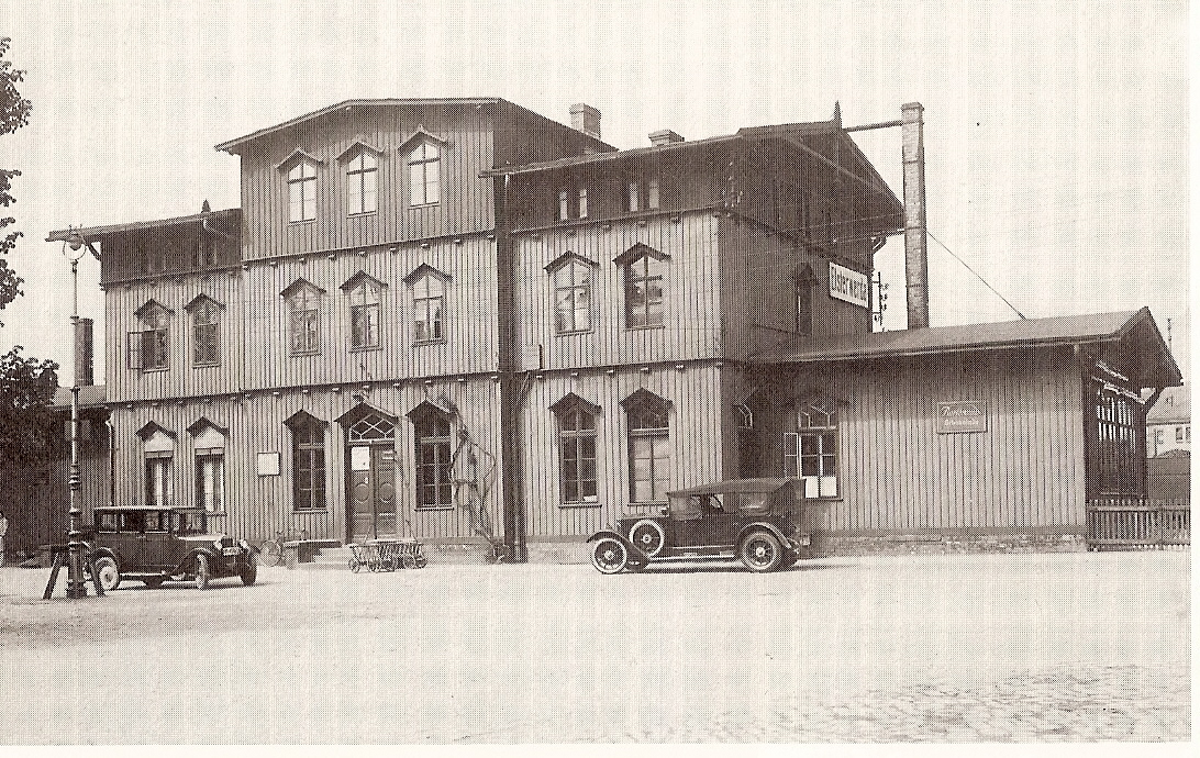 Das Bahnhofsgebäude des Bahnhofs Elsterwerda im Jahre 1923